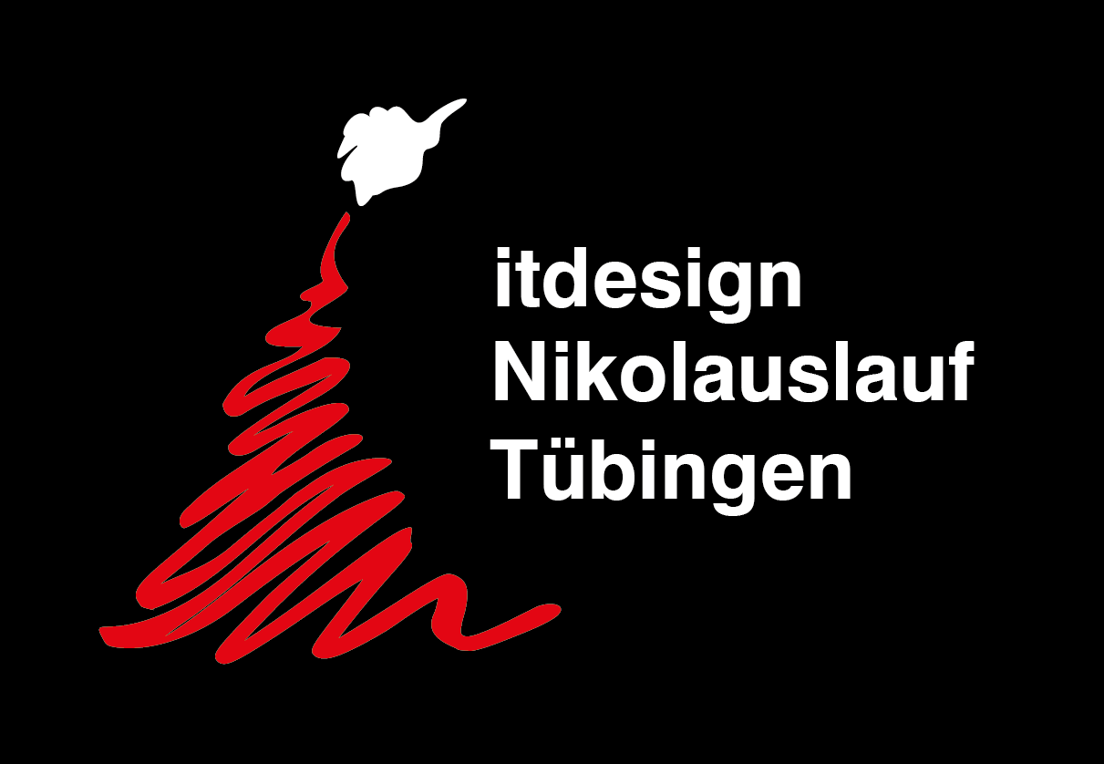 Neues Logo Nikolauslauf Tübingen (seit 2018)